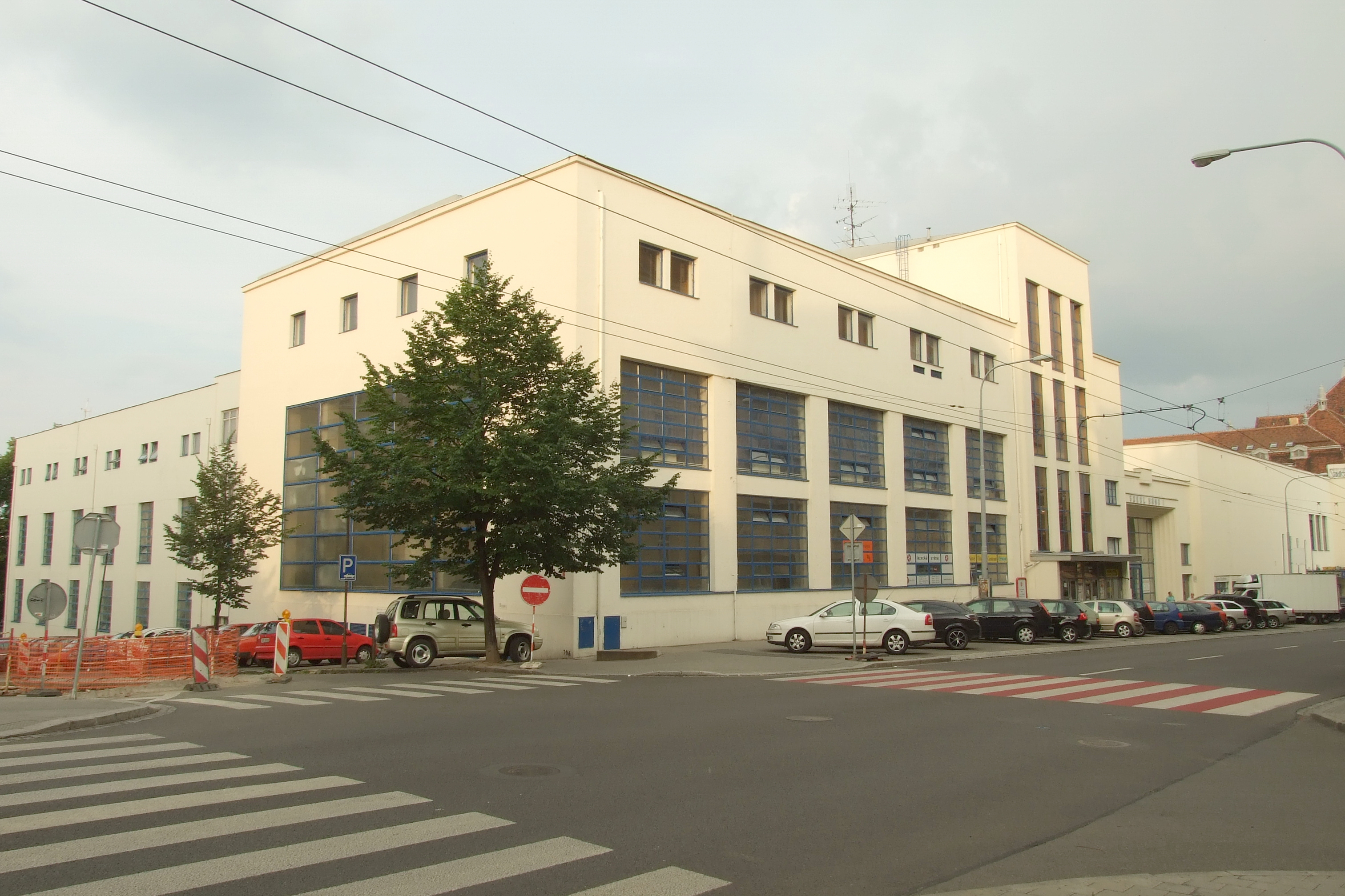 Brno-Veveří - sokolský stadion s tělocvičnou a společenskými prostorami. Leží na nároží Kounicovy a Sokolské ulice. Jedná se o kulturní památku, postavenou v raně funkcionalistickém pojetí, v letech 1928-1929 podle projektu architekta Miloše Lamla pro Sokol Brno I.